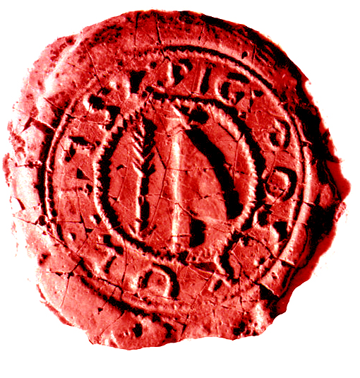 pečat pošte 1752. godine